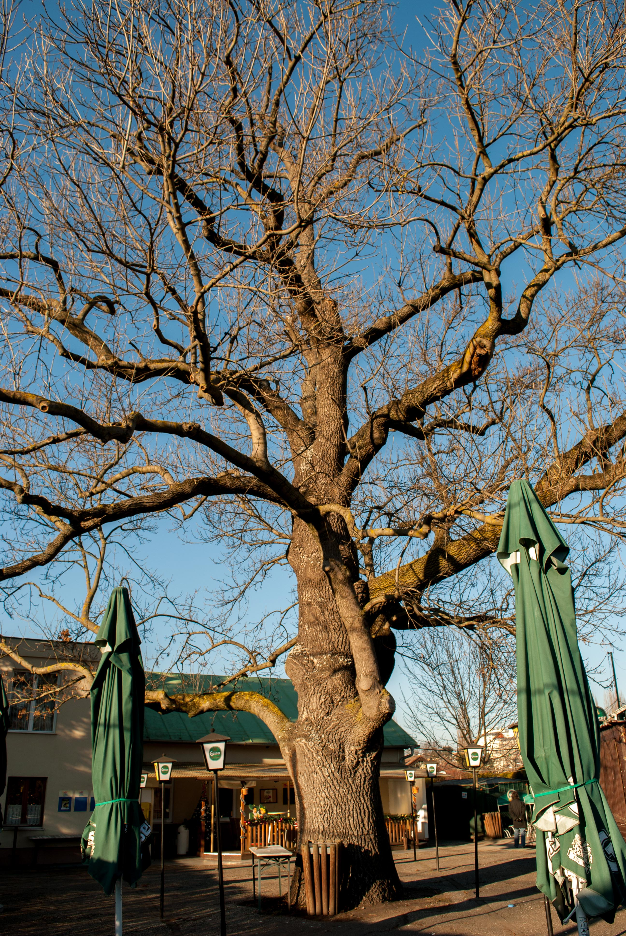 Esche (Fraxinus excelsior) am Rande des Wiener Praters. Die Esche hat einen Brusthöhenumfang von 3 m, die Höhe und der Kronendurchmesser betragen je etwa 17 m. Außerdem ist sie durch ihre ausgeprägte Kronenbildung bedeutend. This media shows the natural monument in Vienna with the ID 430.